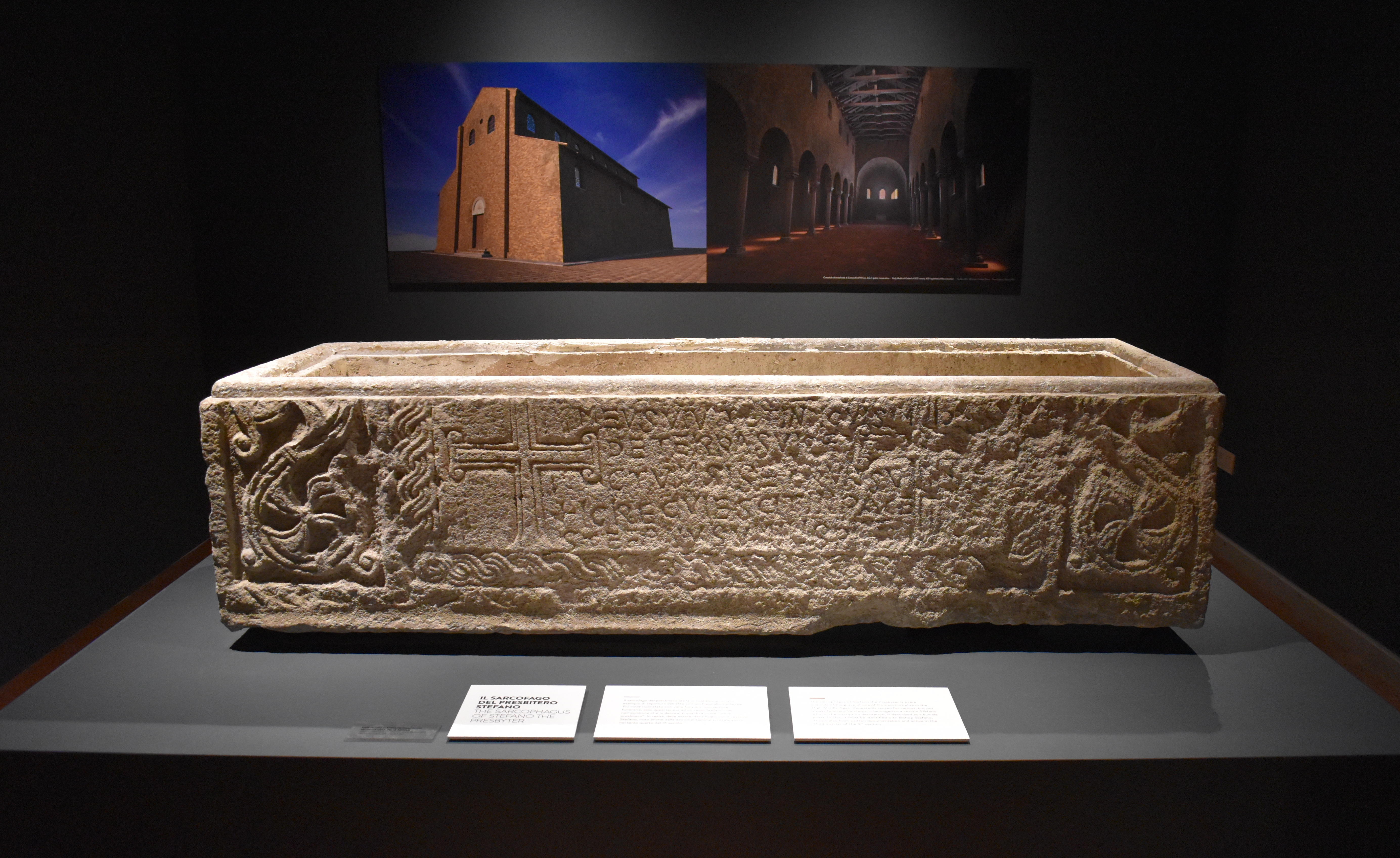 Sarcofago del presbitero Stefano (vescovo?), seconda metà del IX secolo d.C., Museo del Delta Antico, Comacchio This is a photo of a monument which is part of cultural heritage of Italy.